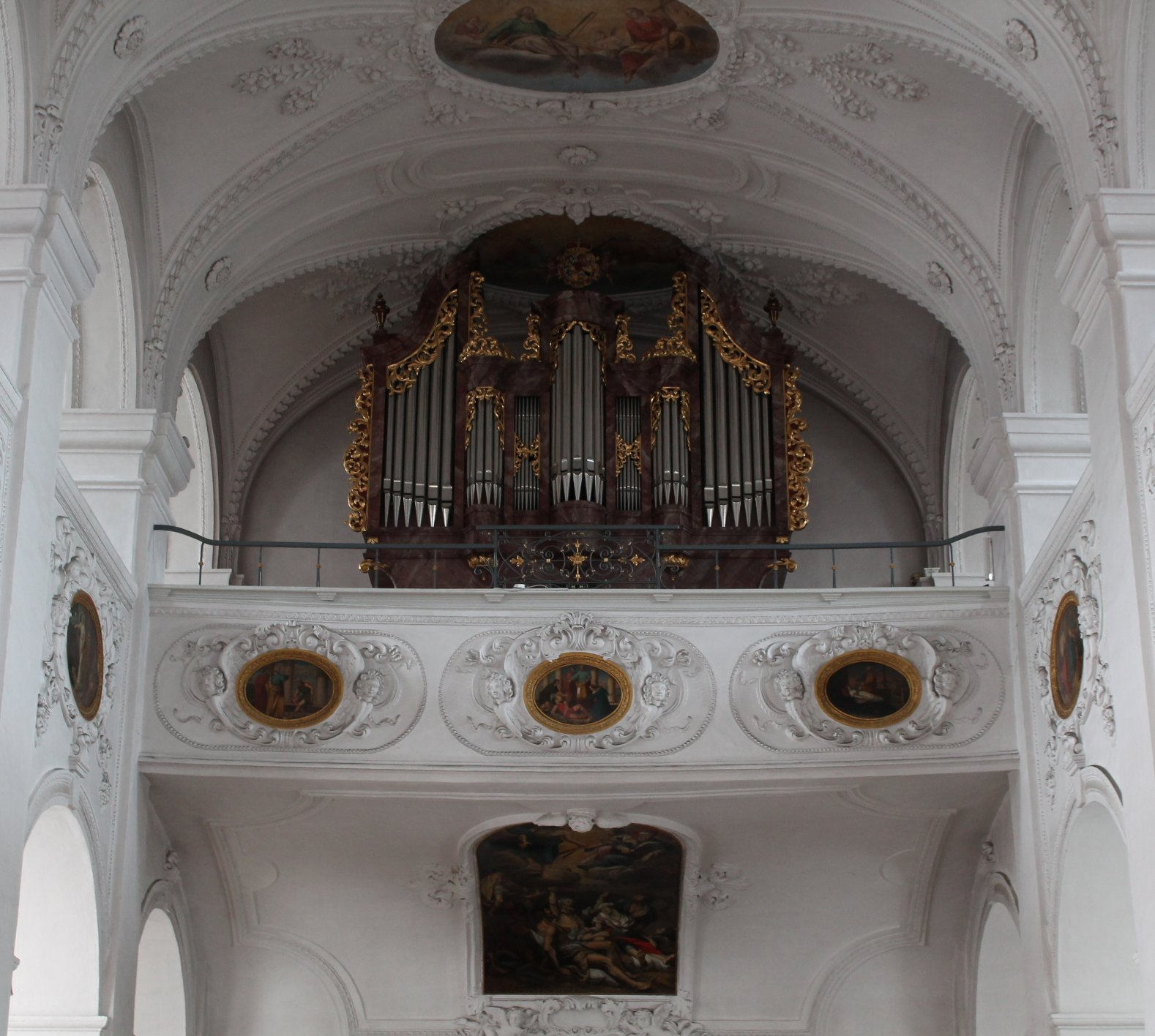 Orgel von St. Peter in Neuburg an der Donau (Max Offner, II/30)